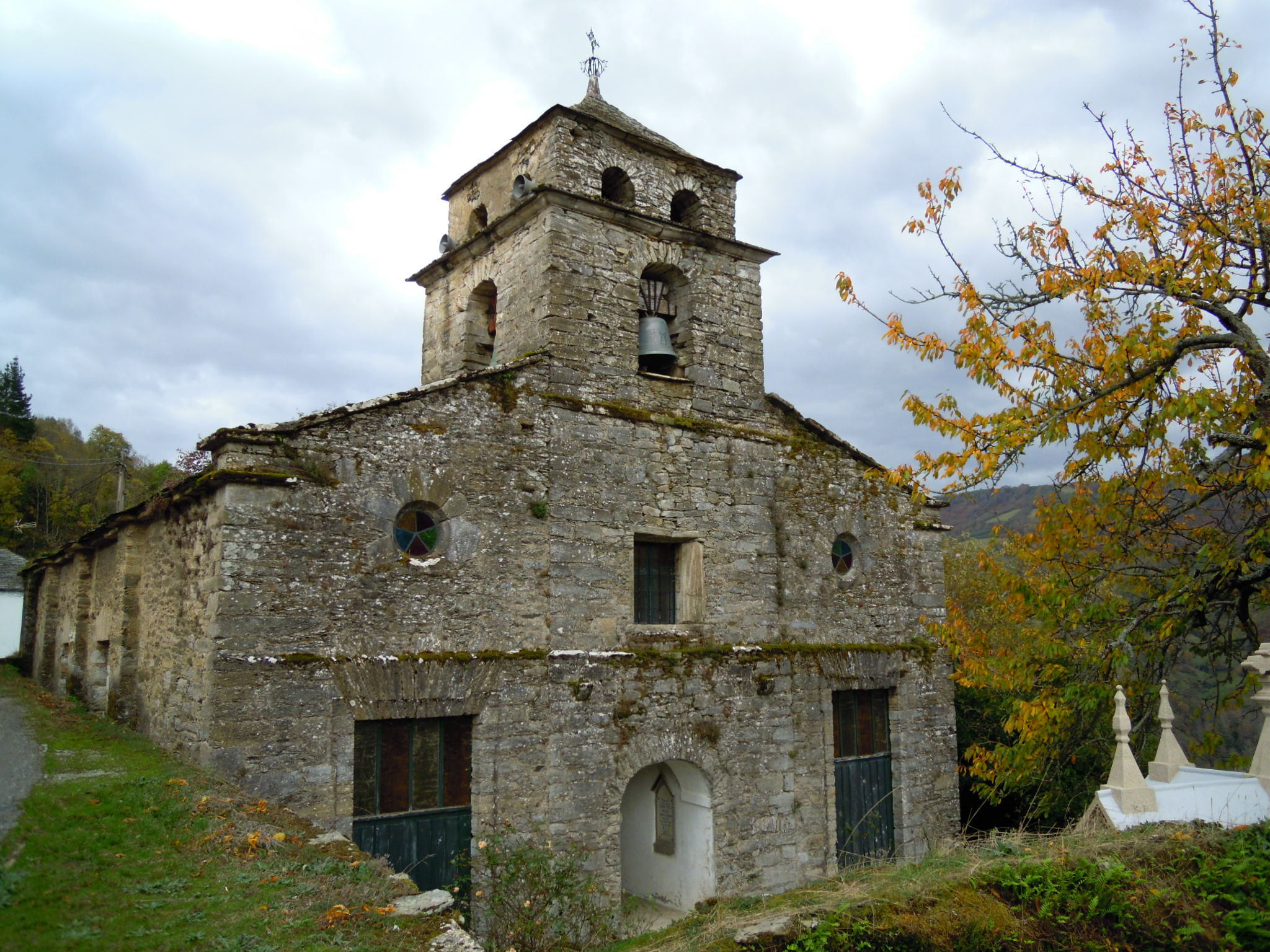 Igrexa parroquial de Noceda (As Nogais).